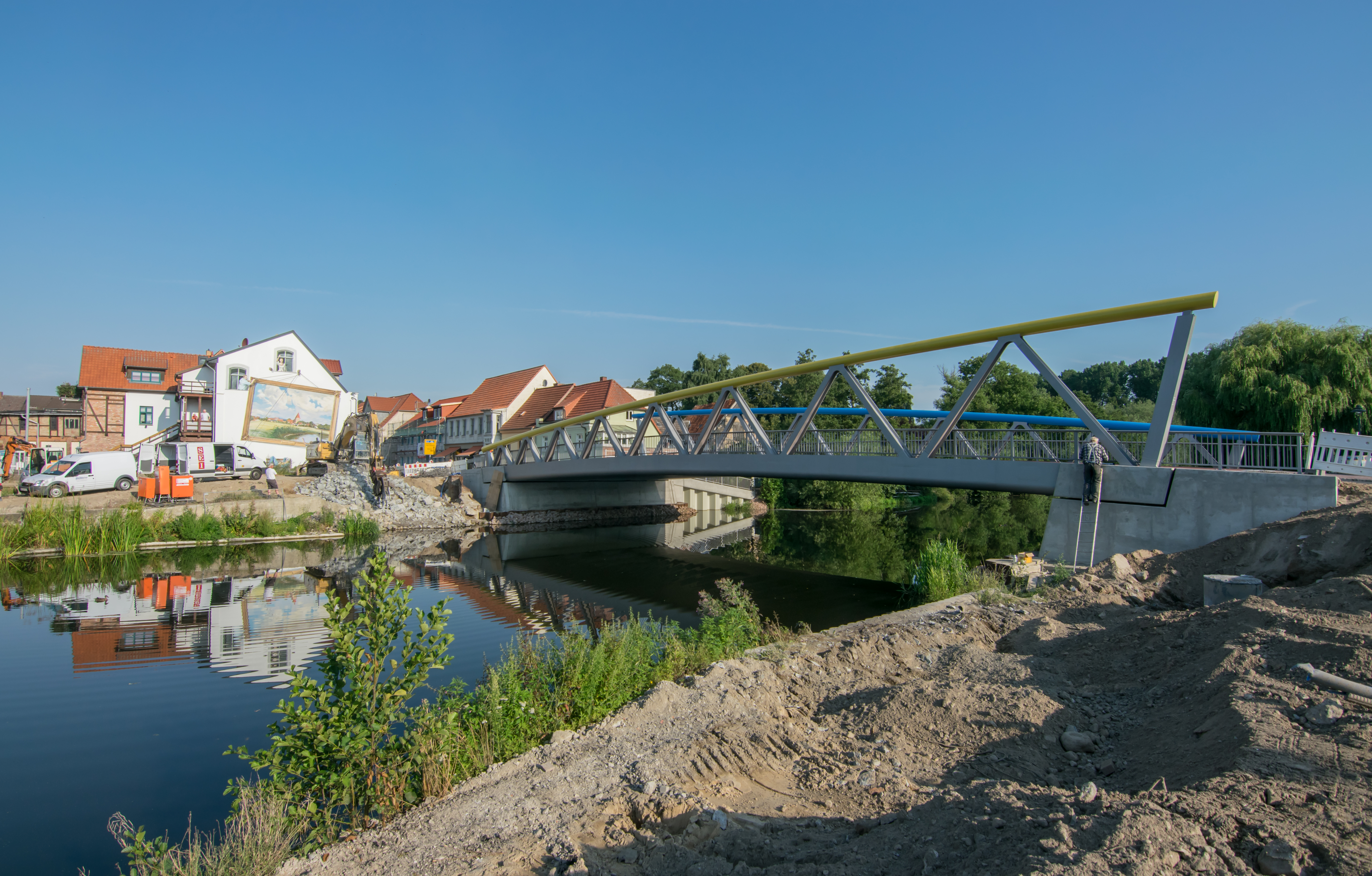 Neue Schwaaner Warnowbrücke - links im Bild letzte Abbrucharbeiten der Behelfsbrücke